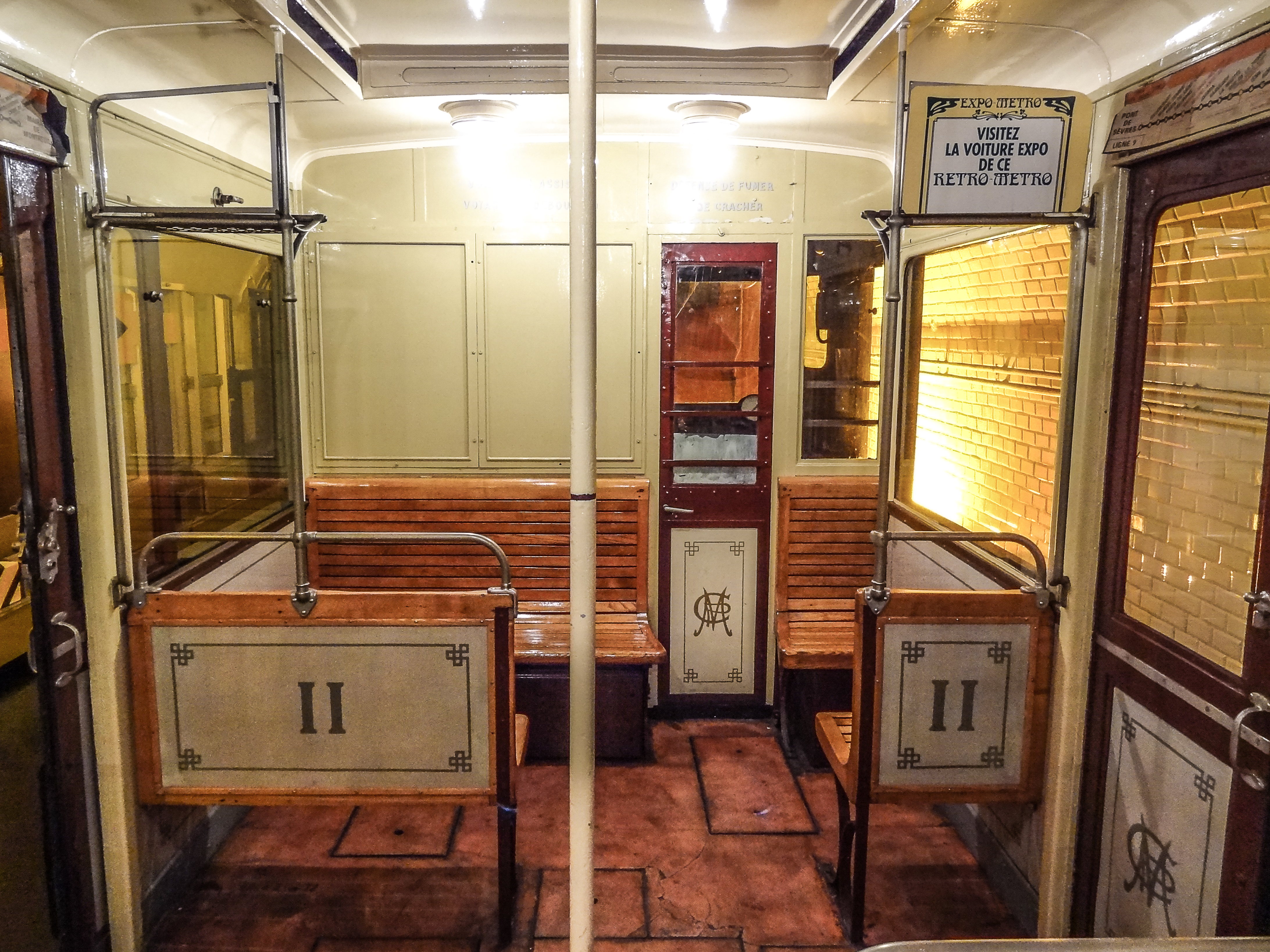 Journées du patrimoine 2012 - Rame Sprague-Thomson.